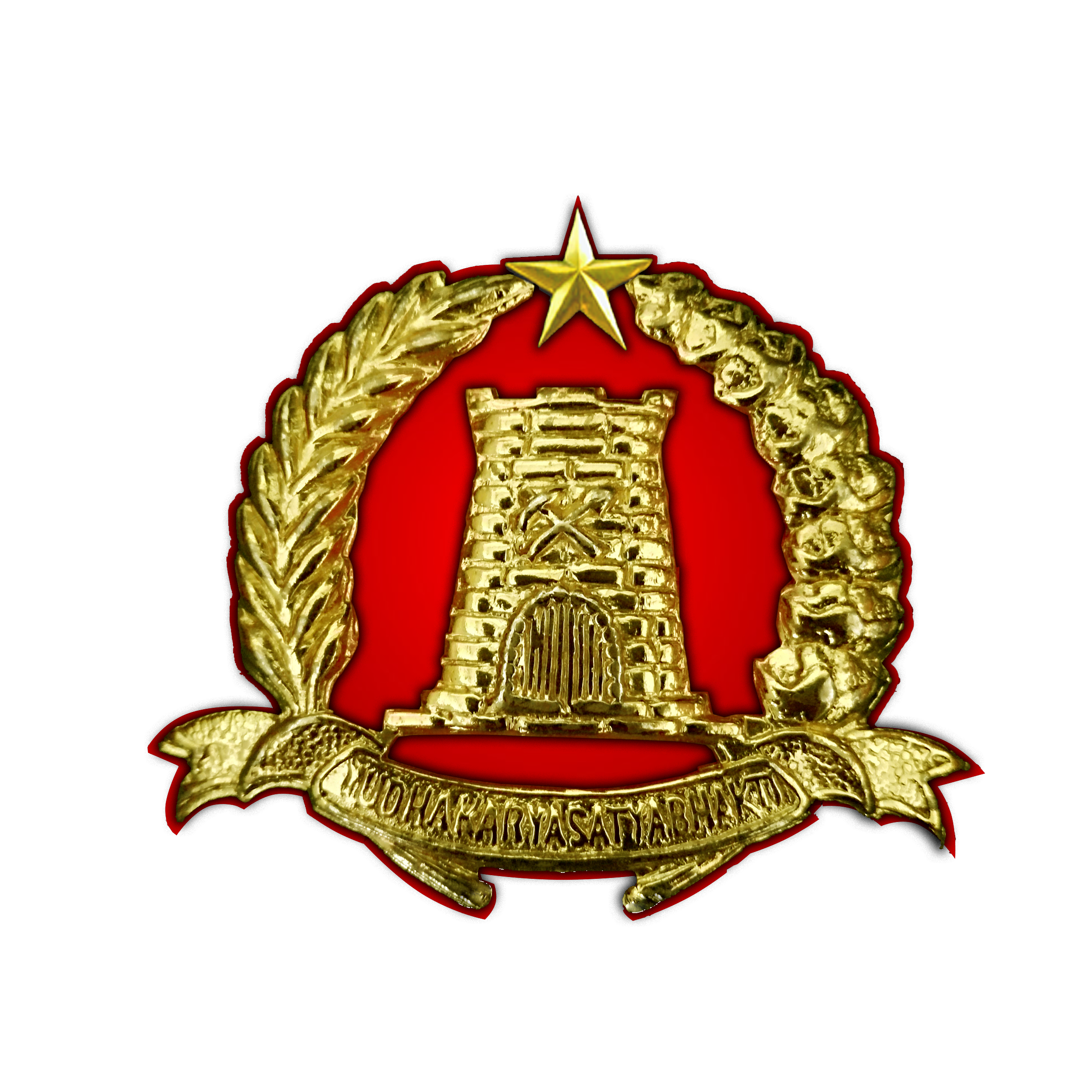 emblem baret zeni tni ad emas